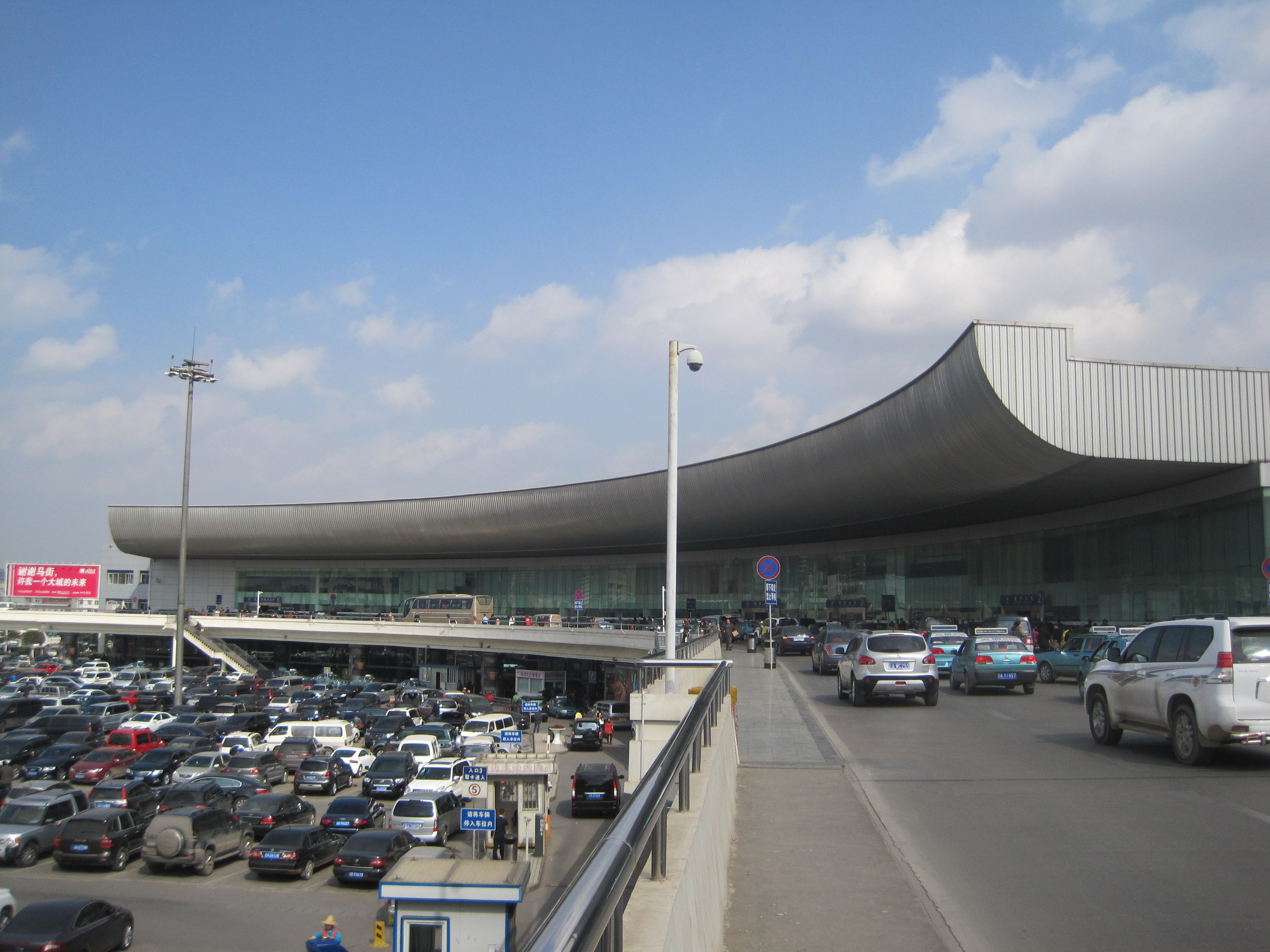 巫家坝机场航站楼正面